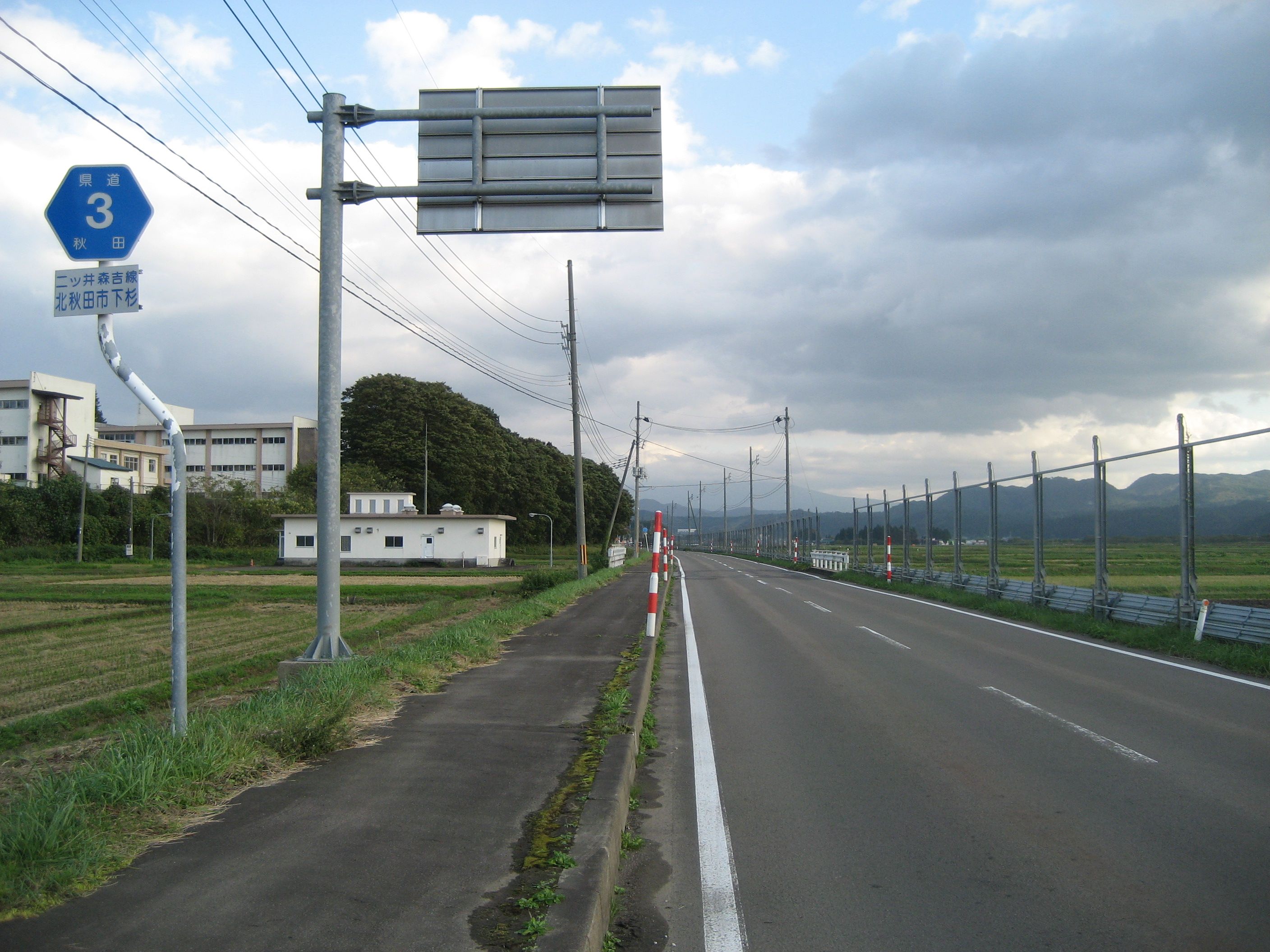 秋田県道3号線北秋田市下杉付近